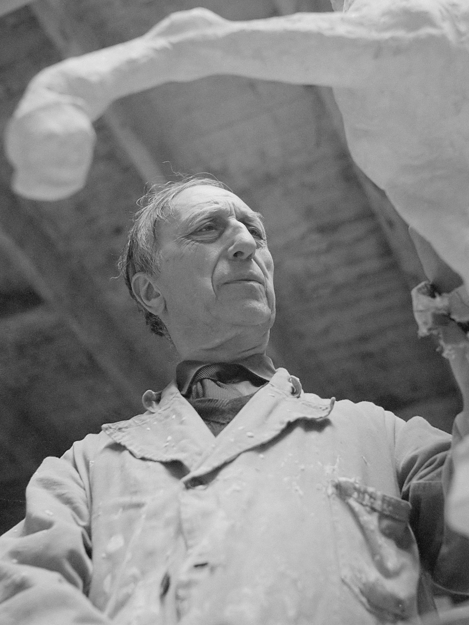 Beeldhouwer Albert Termote 30 maart 70 jaar 22 maart 1957